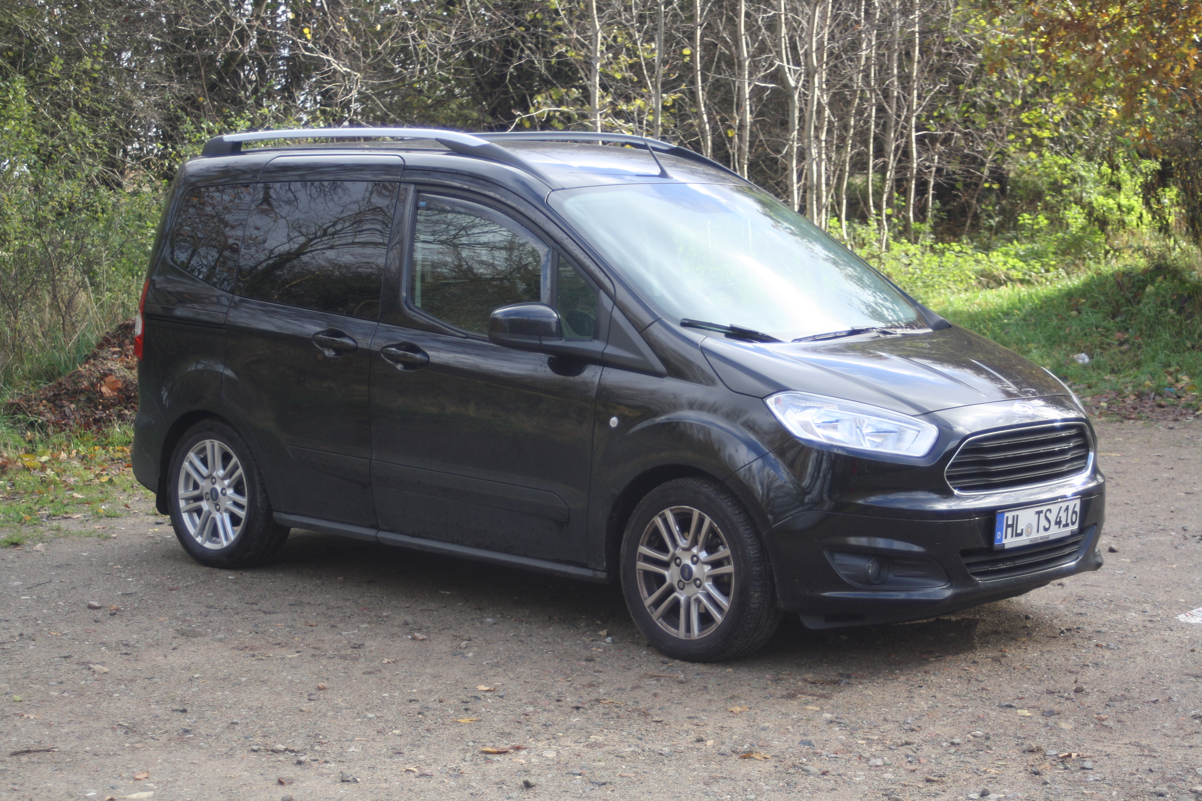 Ford Tourneo Courier Titanium Ausstattung Baujahr Ende 2016